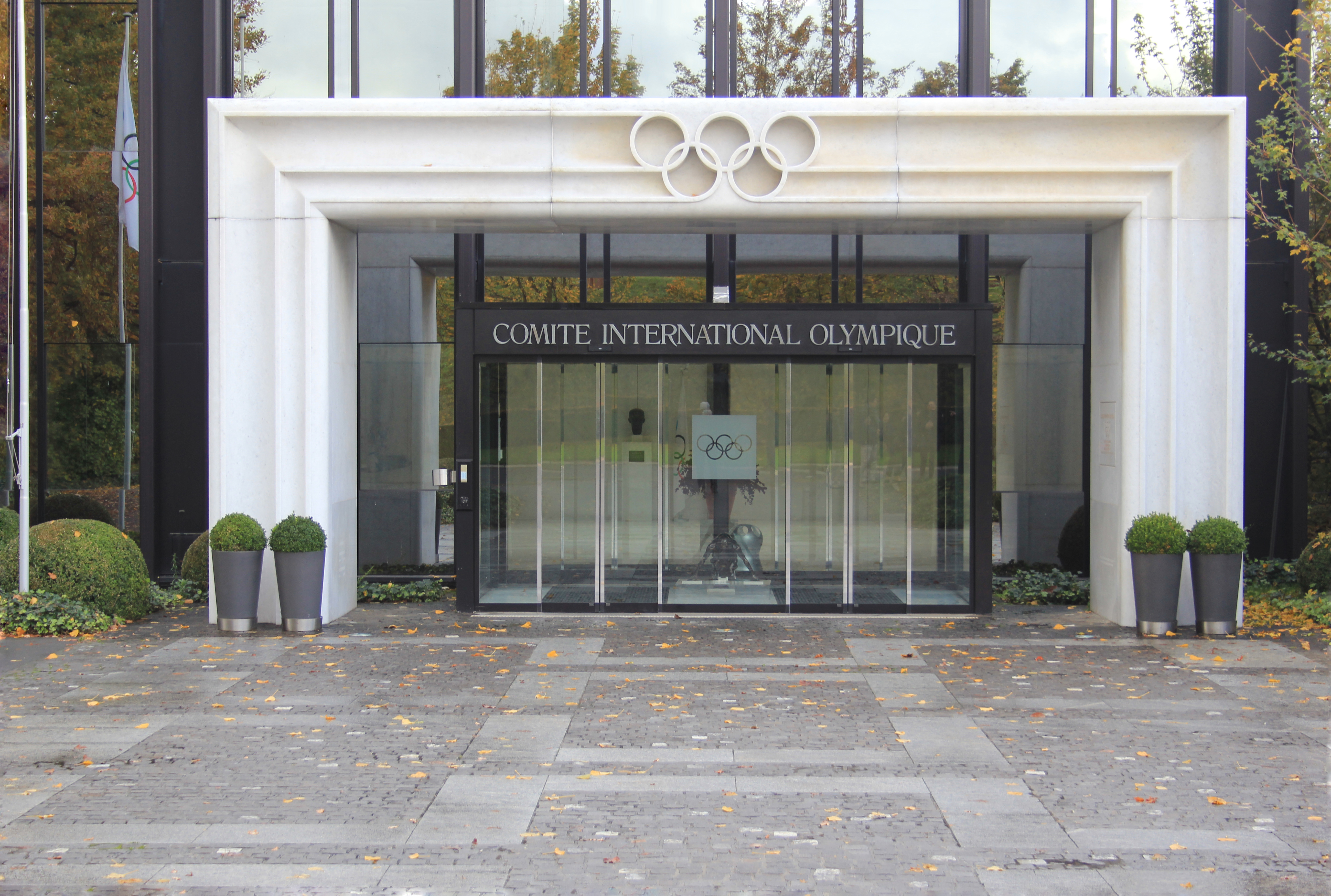 Nouveau siège du CIO - Lausanne - Novembre 2013